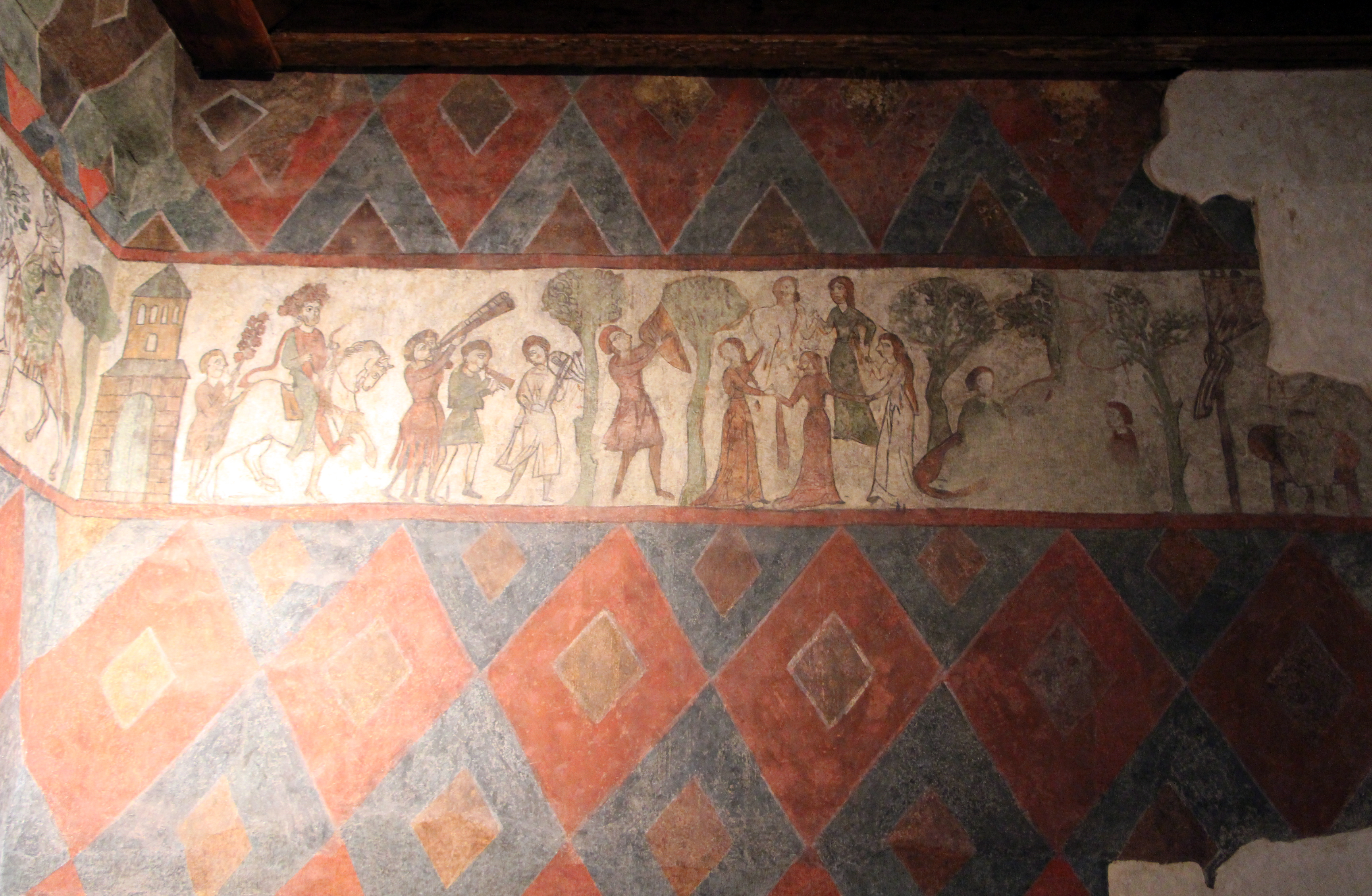 Museo Diocesano (Genoa) The making of this document was supported by Wikimedia CH. (Submit your project!) For all the files concerned, please see the category Supported by Wikimedia CH.